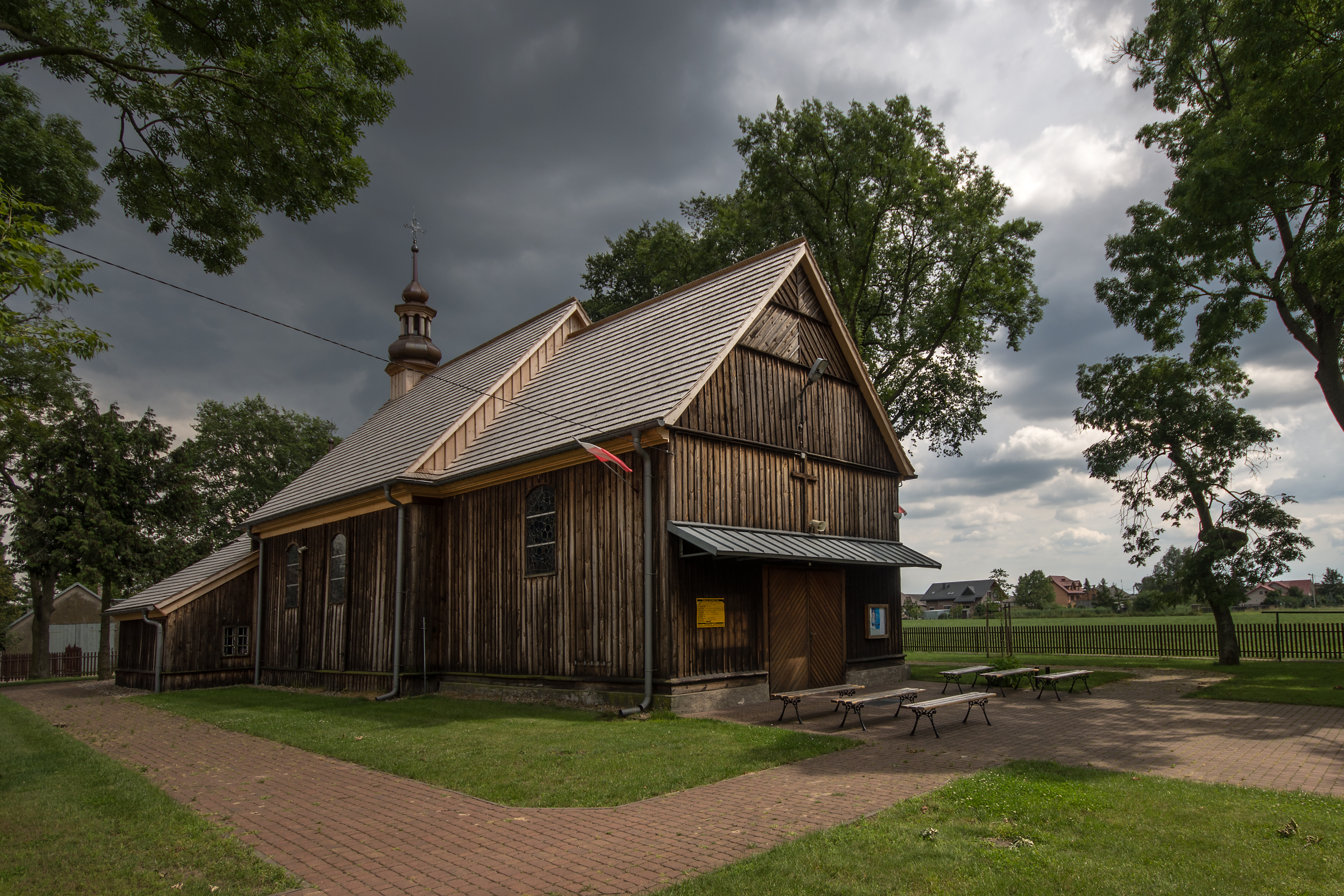 Dąbrowa Wielka, kościół św. Michała, pocz. XVIII